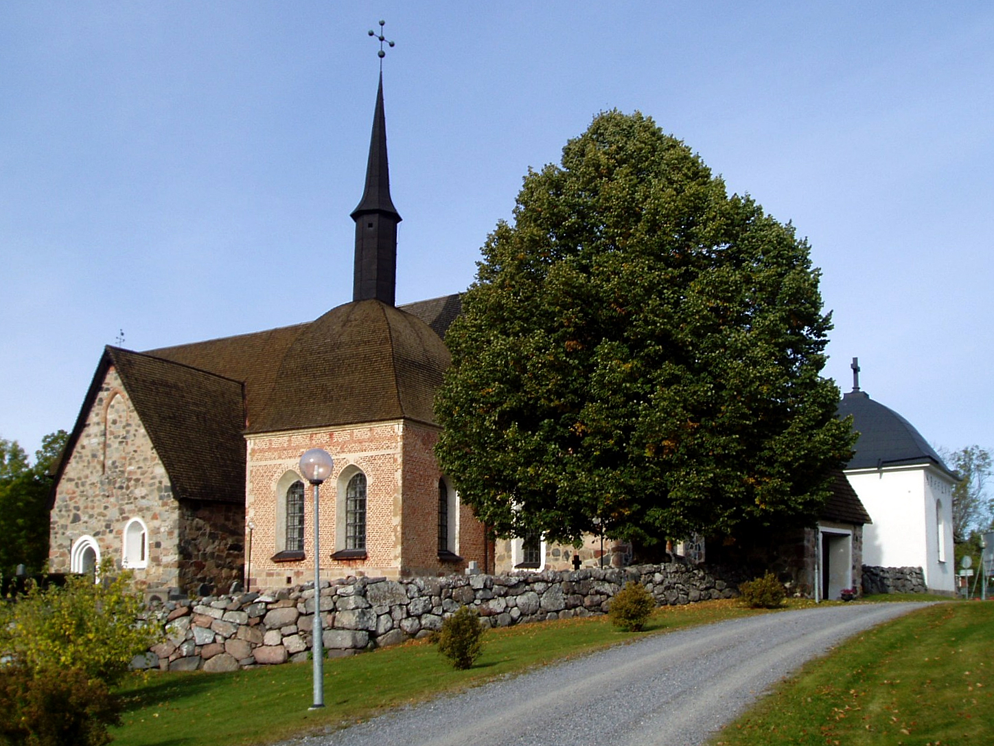 Frötuna kyrka